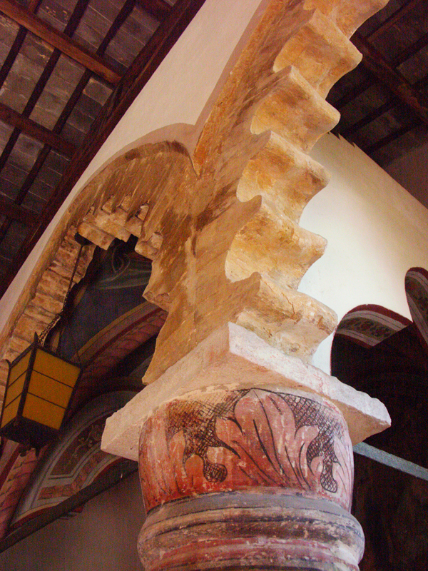 archetti